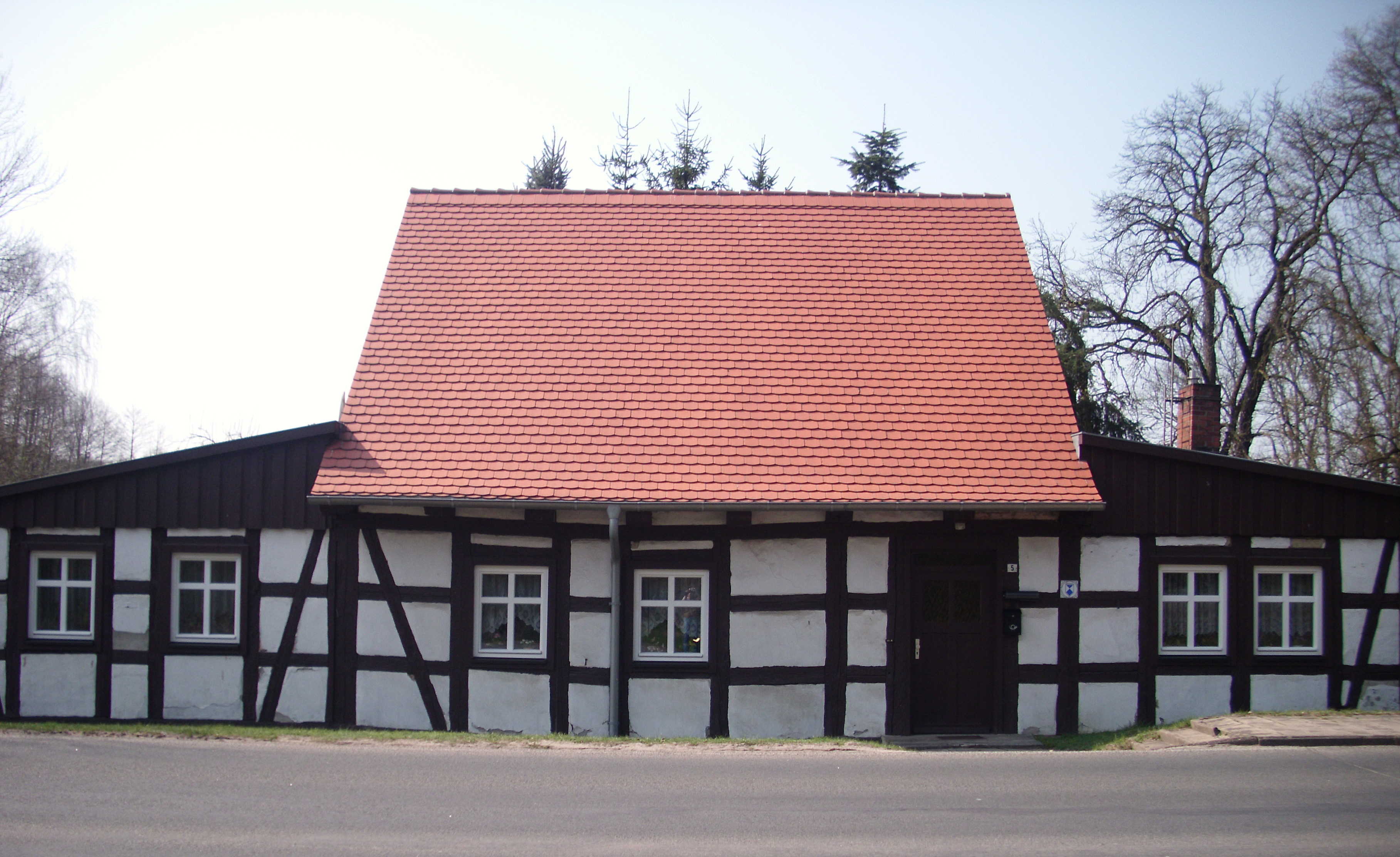 Kaisermühler Straße 5, Wohnhaus